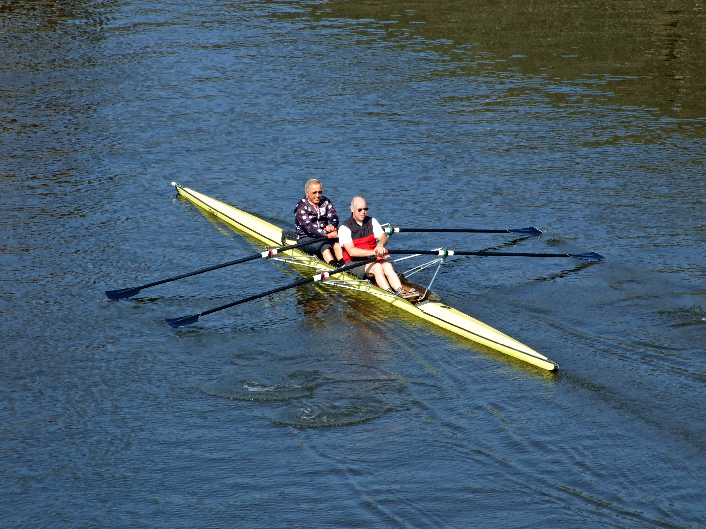 Doppelzweier auf dem Main in Ffm